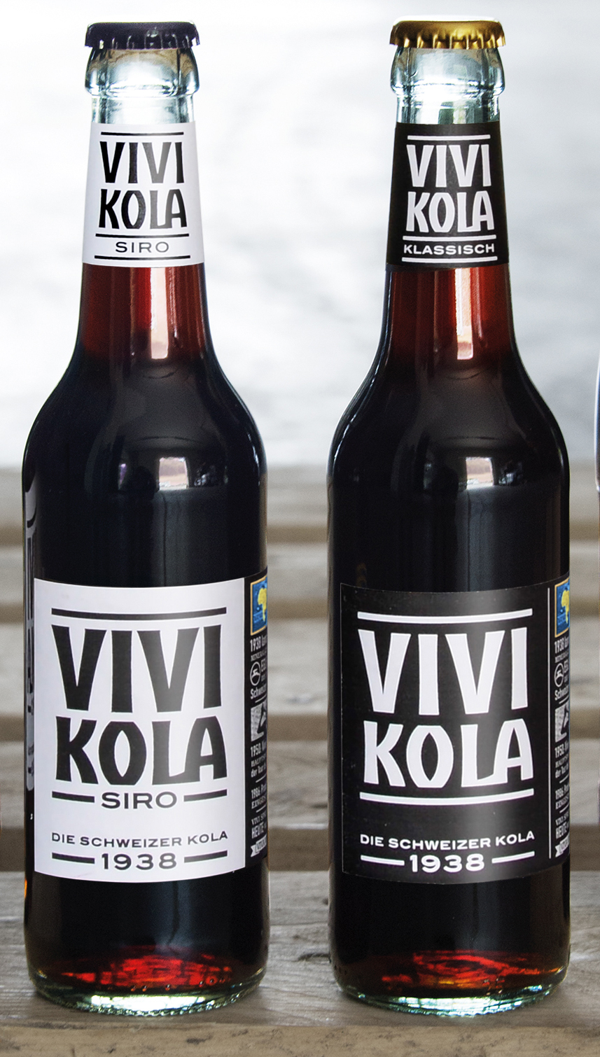 Neue Vivi Kola Flaschen 2016